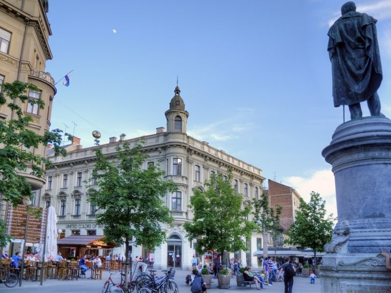 Zagreb